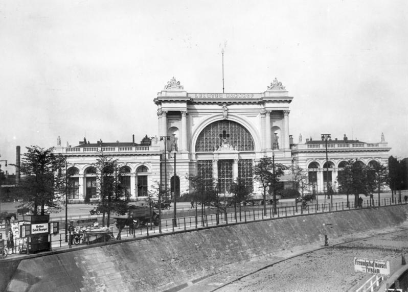 Berlin, Lehrter Bahnhof Scherl: Der Lehrter Bahnhof nach seiner Renovierung 31459-29 [Berlin 1929]